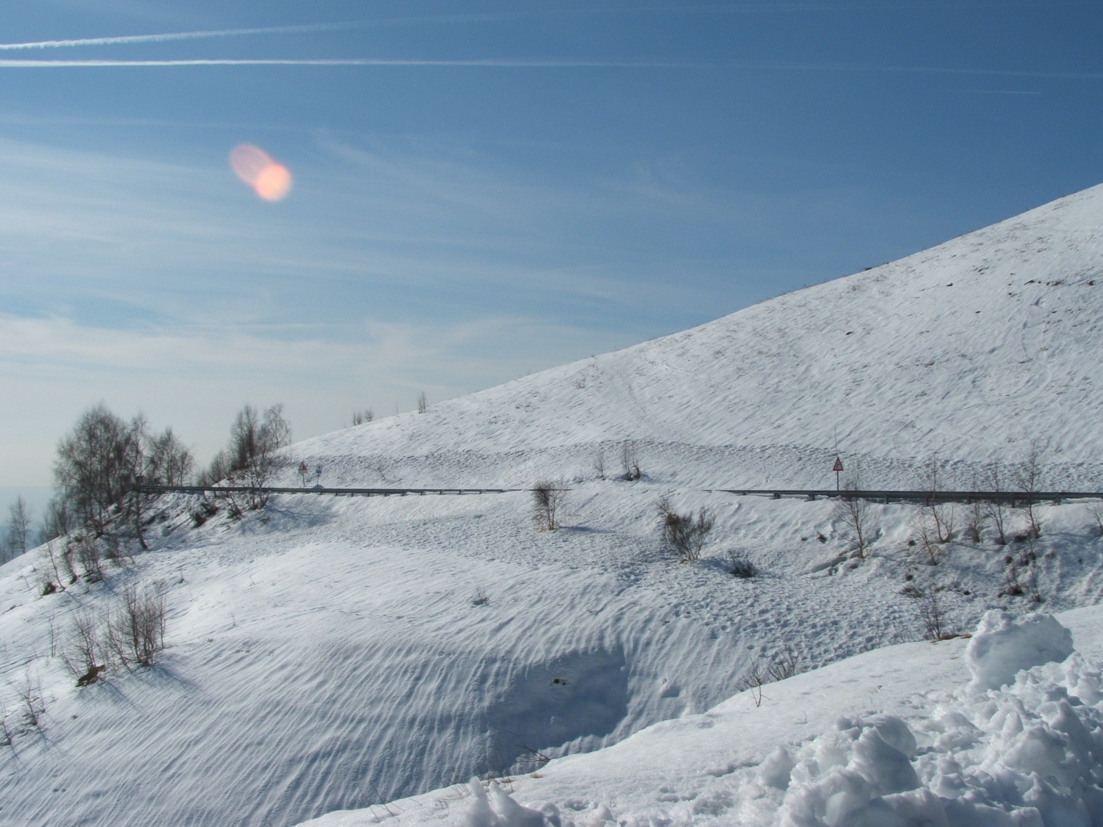 Valle Sessera, zona di Bocchetto Séssera e Bielmonte, Biella (Piemonte, Italia) in inverno